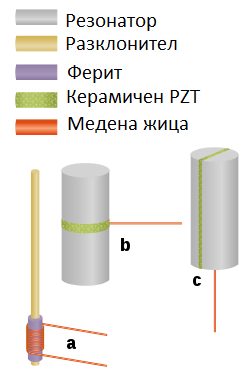 Фигура 4. Механични филтърни преобразуватели (датчици) а) магнетостриктивен датчик b) тип Лангевин пиезоелектричен датчик c)усукан пиезоелектричен датчик